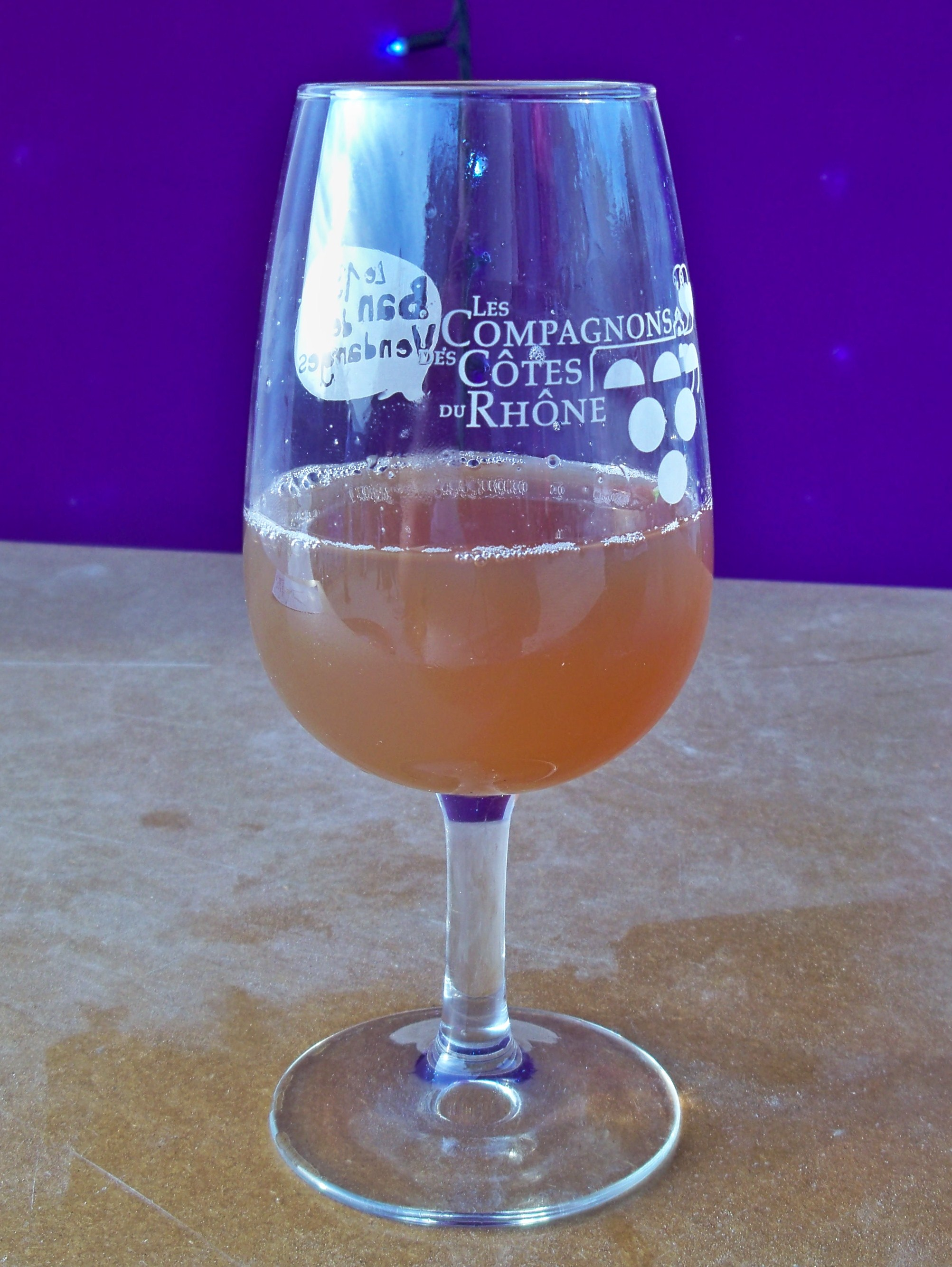 Bourru, suite de la première pression de raisin (lors du Ban des Vendanges 2010 à Avignon, Vaucluse, France)